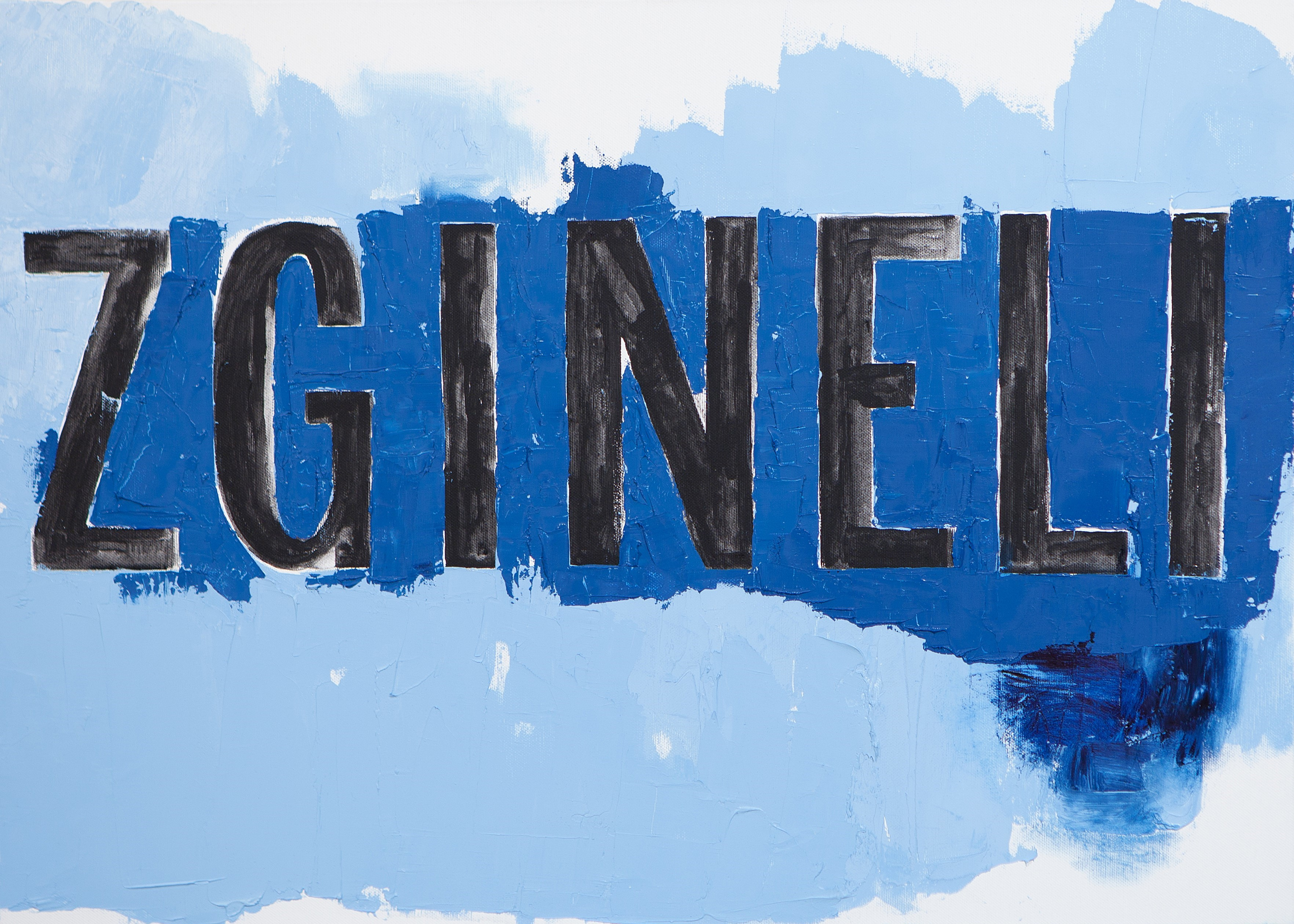 Obrazy prezentowane na wystawie podejmują temat klisz językowych obecnych w debacie publicznej w Polsce XXI wieku oraz kryjących się za nimi ideologii. Sawicka używa słów o silnym emocjonalnym zabarwieniu – płakali, krzyczeli, zginęli. Czasowniki są w czasie przeszłym, nie wiadomo jednak czy odnoszą się do historii czy aktualnych wydarzeń. Stawia tym samym pytanie o przenikanie zwrotów charakterystycznych dla narracji o przeszłości do języka aktualnej debaty i zasadność tworzonych w ten sposób analogii. Sawicka uprawia sztukę na bazie językowych resztek, sloganów z politycznych transparentów, nagłówków z tabloidów, wiadomości telewizyjnych. Jest malarką konkretnych czasów, czujnie dokumentującą polityczny spór polaryzujący współczesną Polskę. Pokazuje światopoglądowe niekonsekwencje, tropi niespójne tożsamości uczestników sporu.